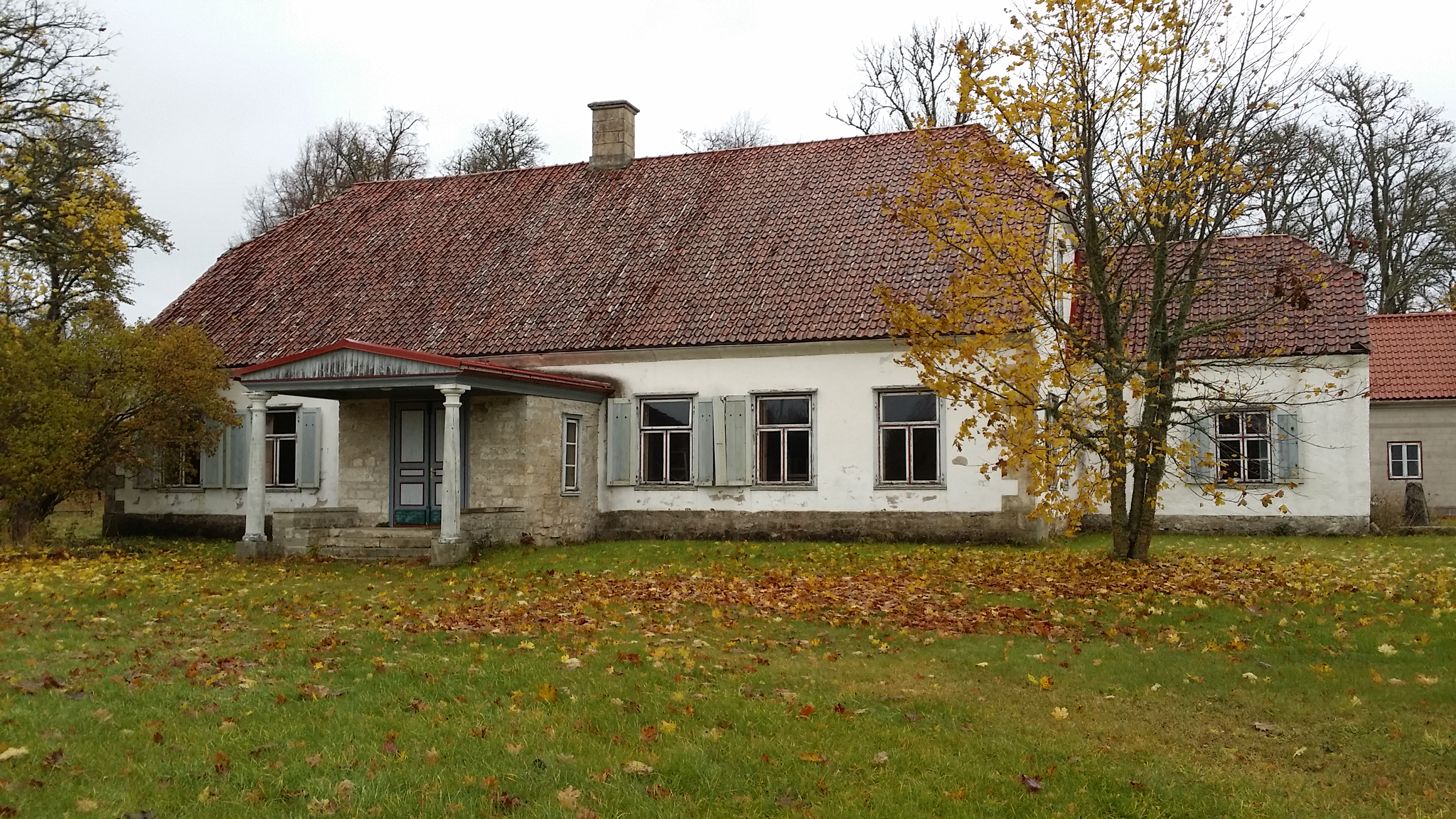 Pidula mõisa peahoone esivaade